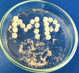 Plastik üretim peletleri (büyük olan) ve kozmetiklerdeki plastik mikroboncuklar (küçük olan)